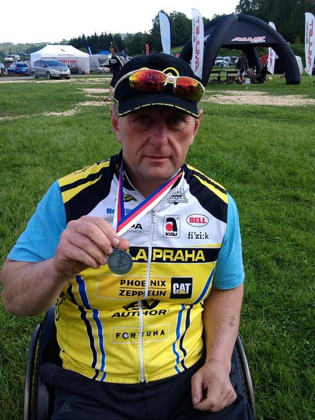 Tomáš Mošnička